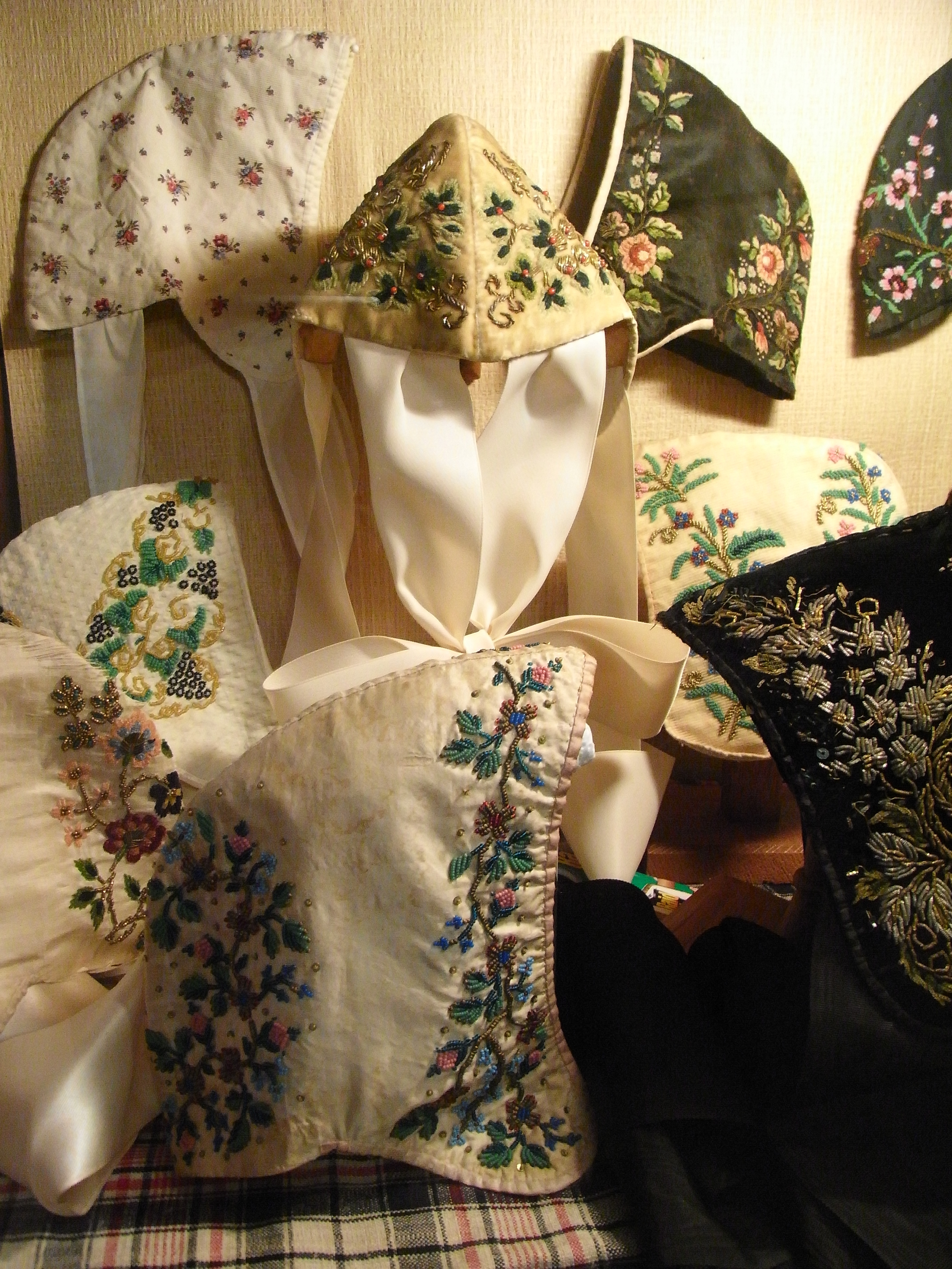 Coiffes Diairi, tradition du Pays de Montbéliard.